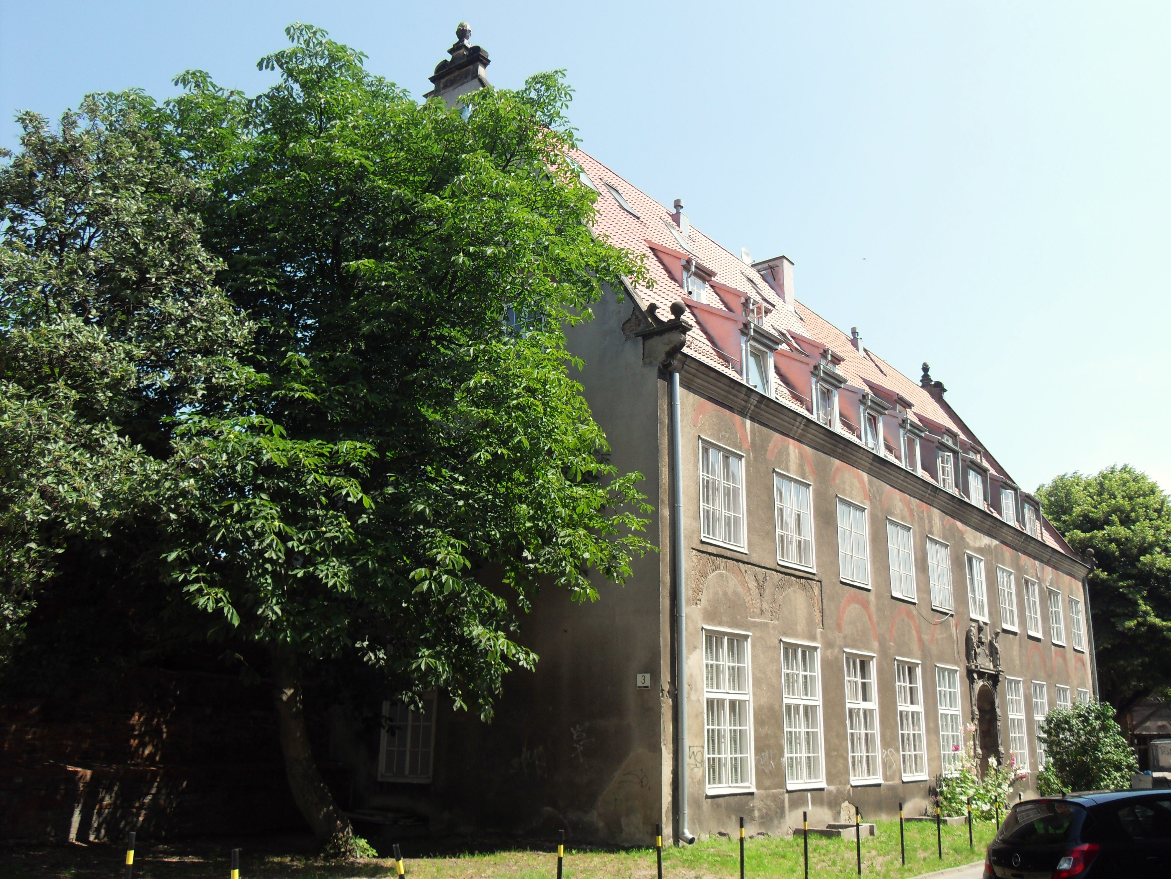 Gdańsk Główne Miasto, ul. Tobiasza 3. Dawny szpital św. Ducha, przy kościele św. Ducha w Gdańsku.